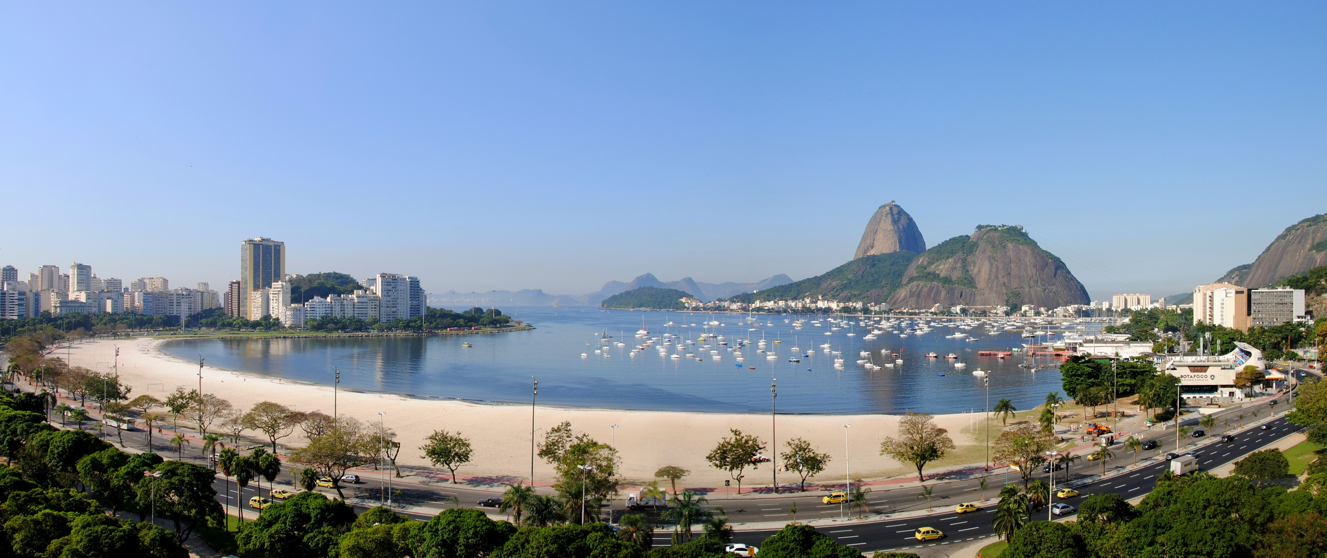 Panorama da enseada de Botafogo, no Rio de Janeiro, Brasil.